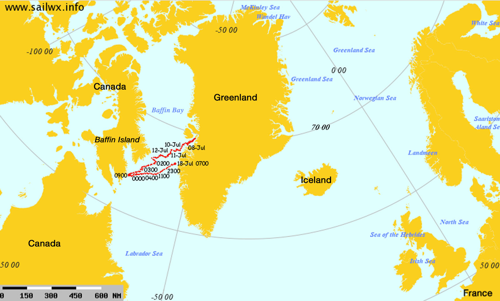 CarteSailwx-12-07-18-LaLouise-WKA